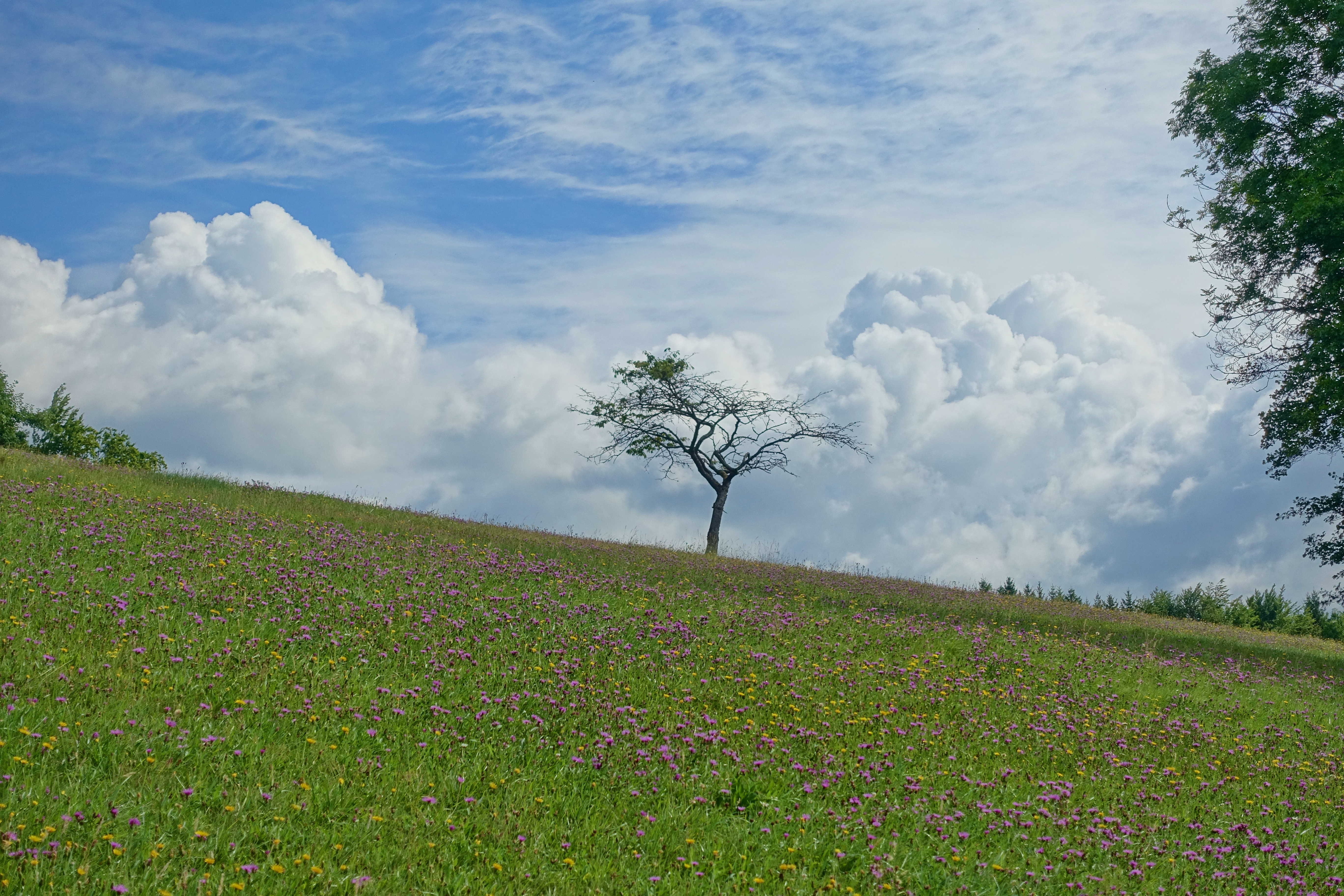 NSG Oberer Schwarzenbach